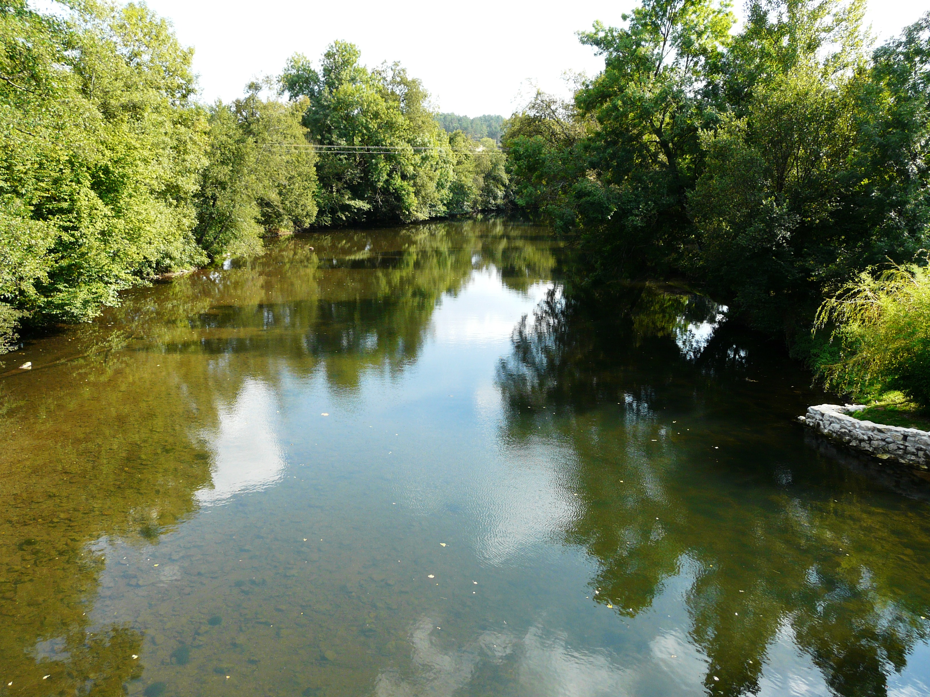 L'Isle (vue vers l'aval) à l'est du bourg de Sarliac-sur-l'Isle, Dordogne, France